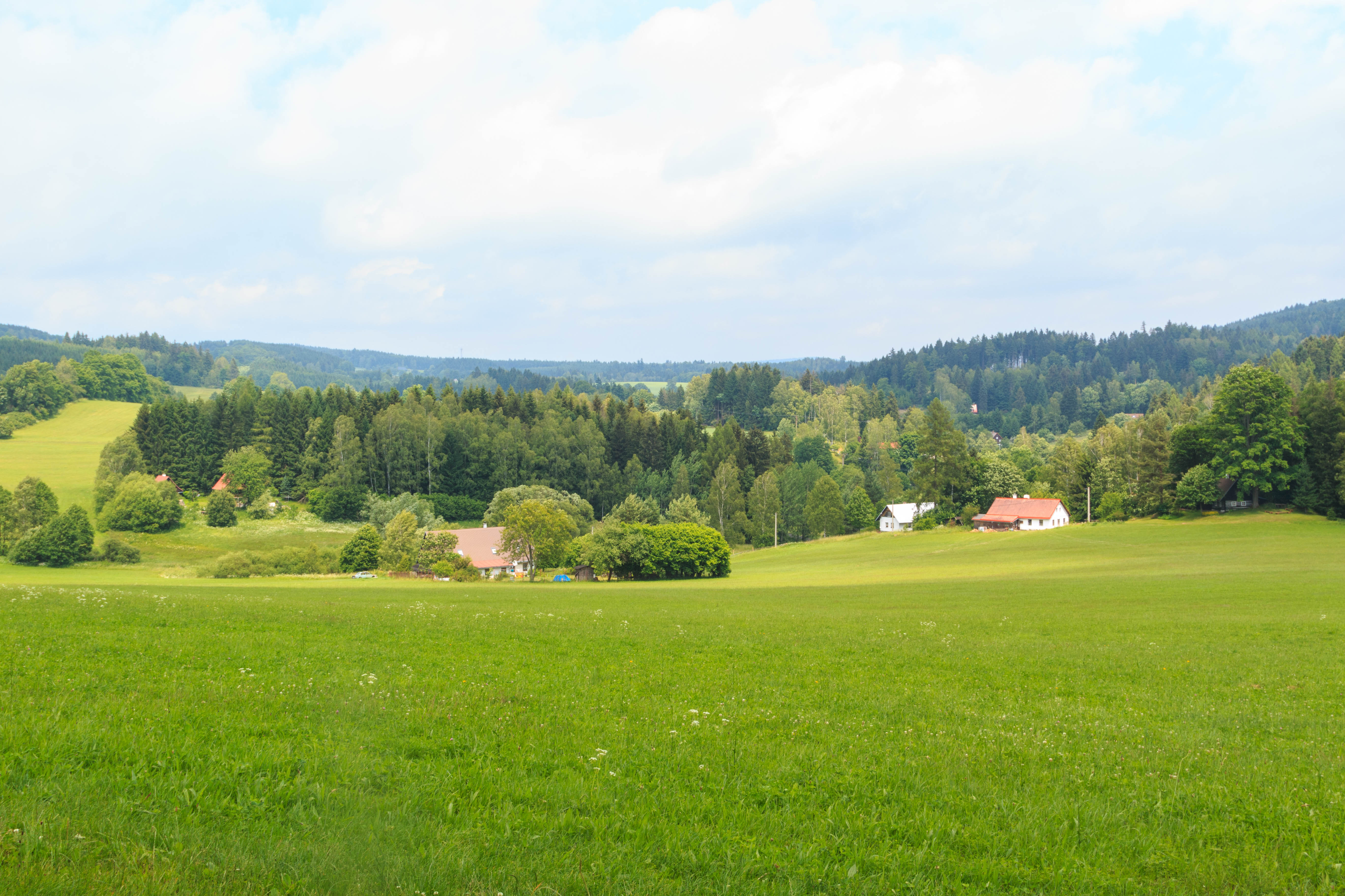 Rzy u Nového Hrádku